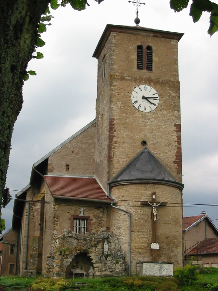 Église Saint-Martin à Flin (Meurthe-et-Moselle)